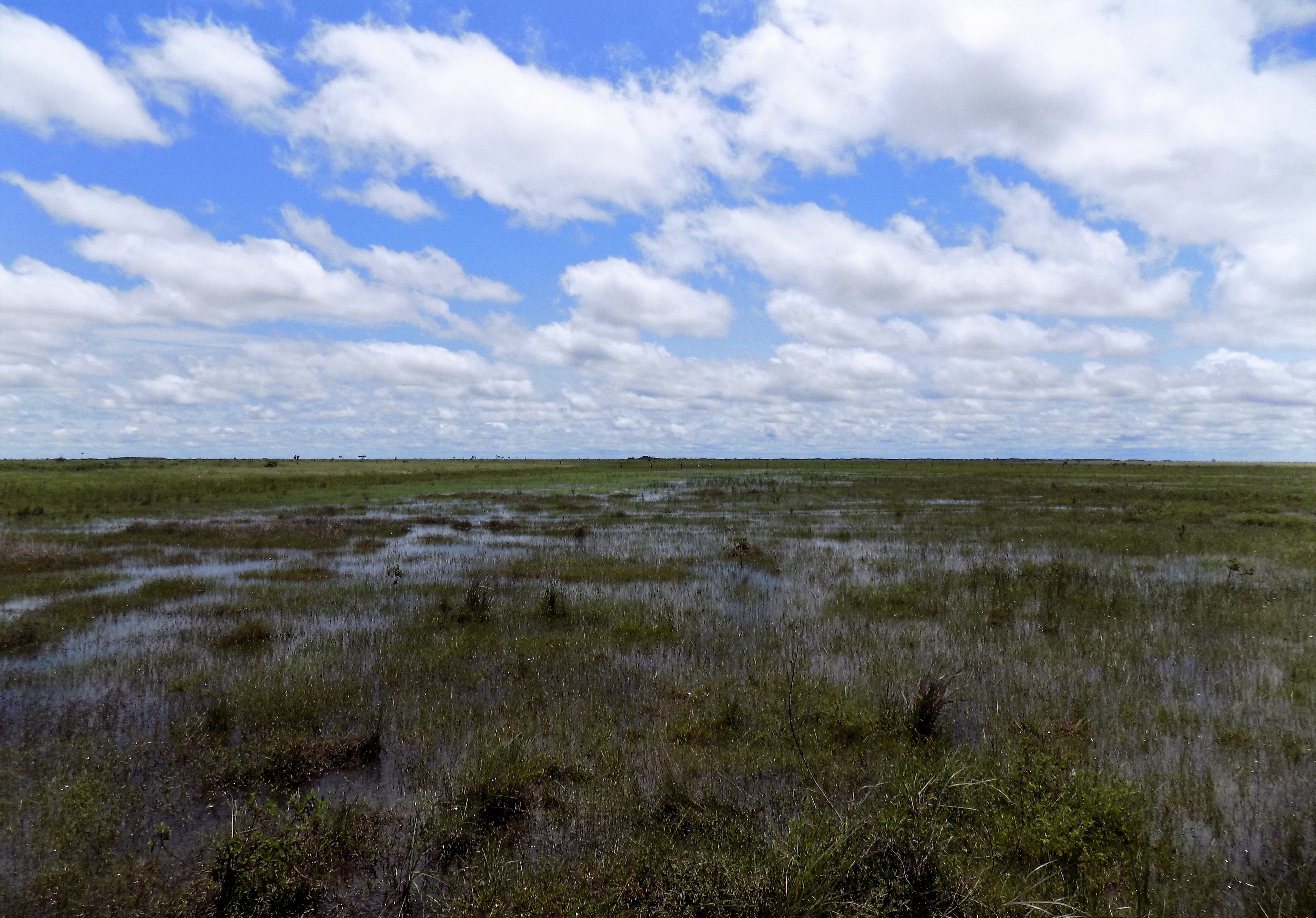 Entre el mes de abril y mediados de octubre a lo largo de la sabana se pueden apreciar estas lagunas poco profundas, donde abundan las aves zancudas, los patos, tortugas e incluso peces y anfibios.